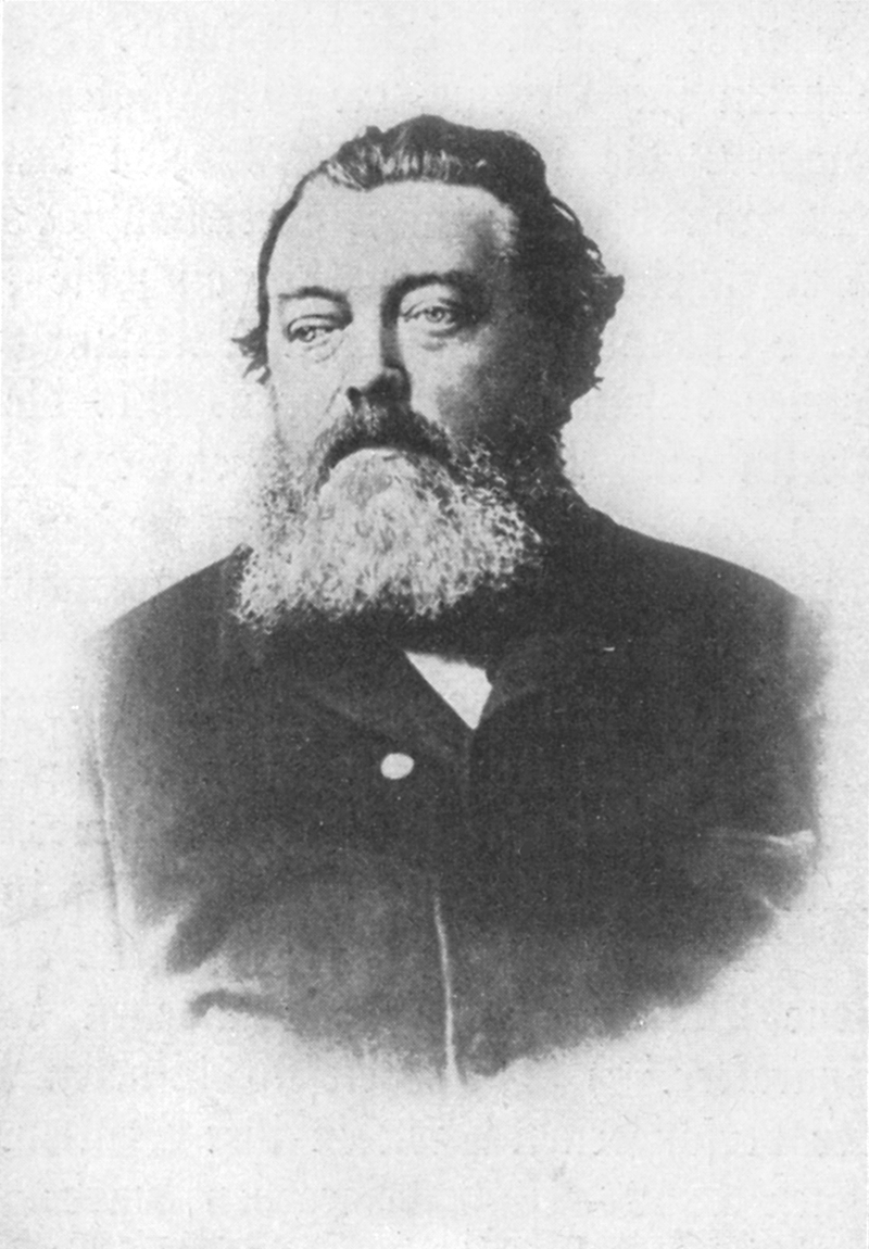 Bielefelder Industrieller und Politiker Rudolf Rempel